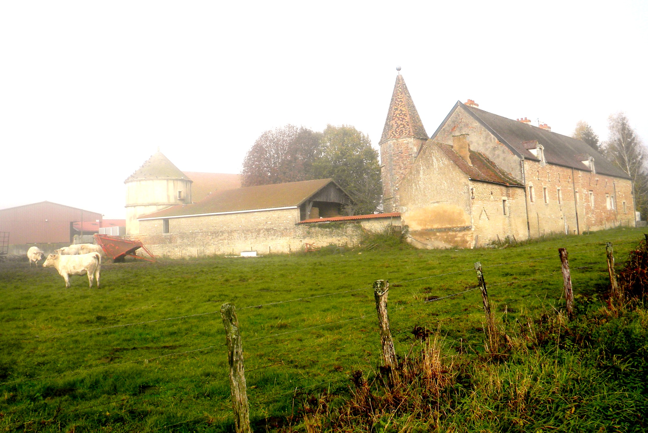 Bieno en Argilly Francio (Côte d'Or)